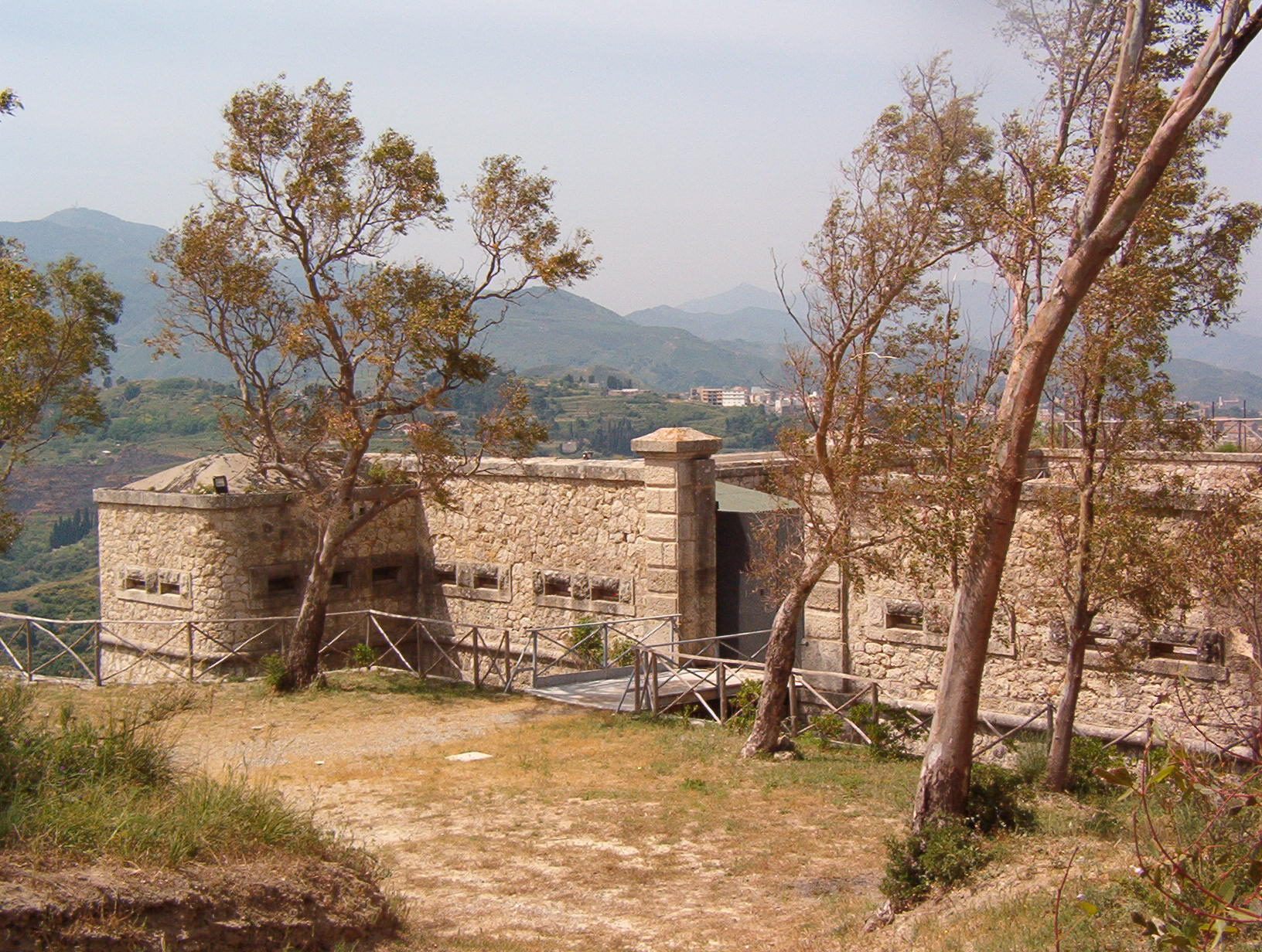 Veduta principale del "Forte dei Centri" di Salice (Messina).